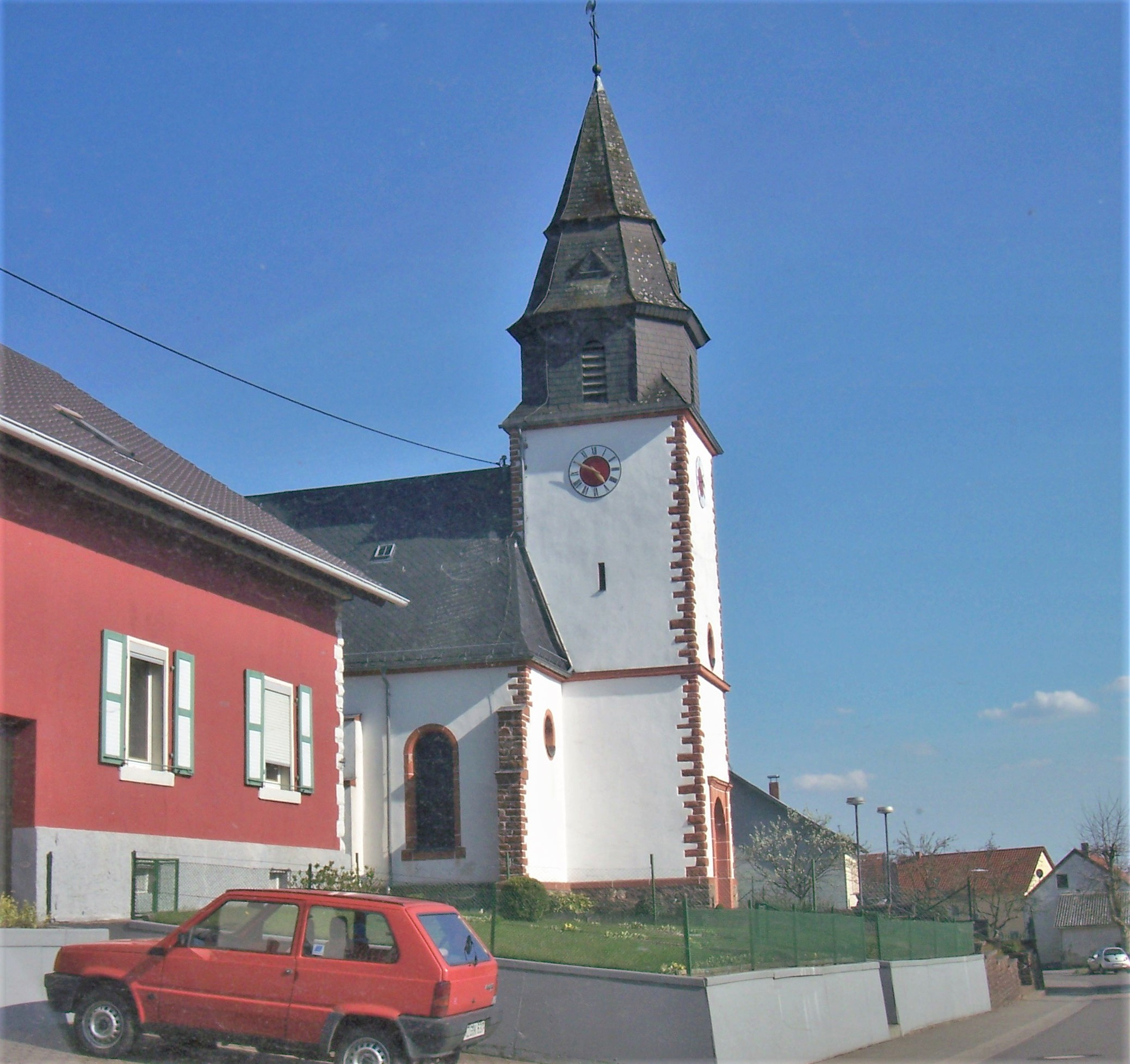 The church "Herz-Jesu" in Bergen, Saarland, Germany